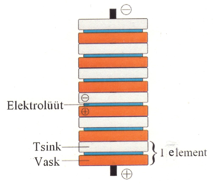 File:VoltascheSaeule Schema.png eestikeelse tekstiga